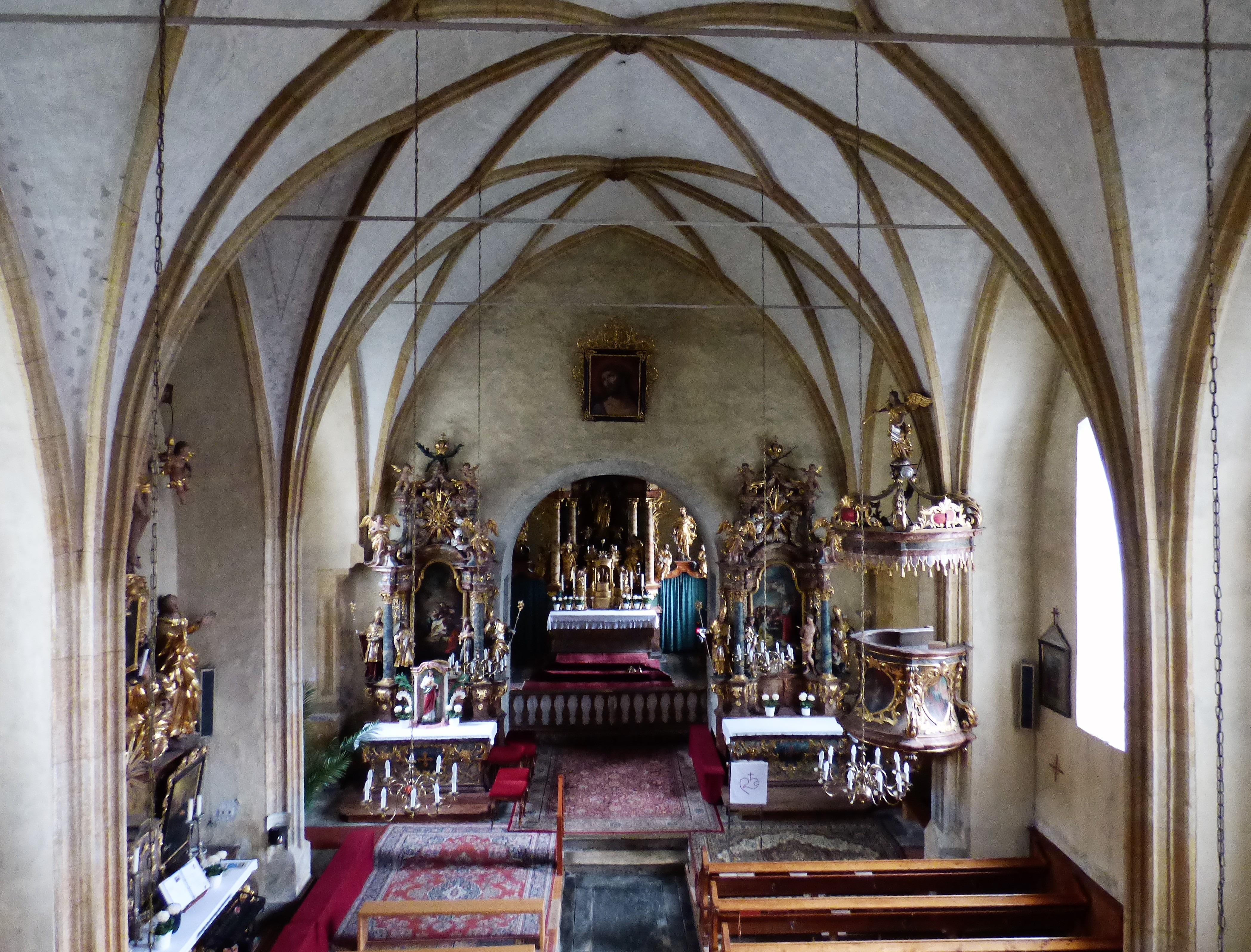 Innenansicht Kirche Mariae Himmelfahrt, St. Marein (Gemeinde Neumarkt), Steiermarkt